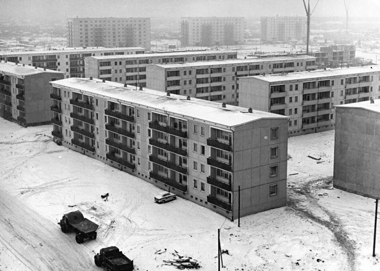 Berlin, Hans-Loch-Strasse, Wohnblocks, Winter ADN-ZB Brüggmann 21.12.1963 Neubau-Komplex Hans-Loch-Straße Im Berliner Stadtbezirk Lichtenberg entsteht ein Neubau-Komplex für mehr als 10.000 Menschen im Gebiet der Hans-Loch-Straße. UBz: Blick auf einen Teil der bereits fertigen Neubauten.